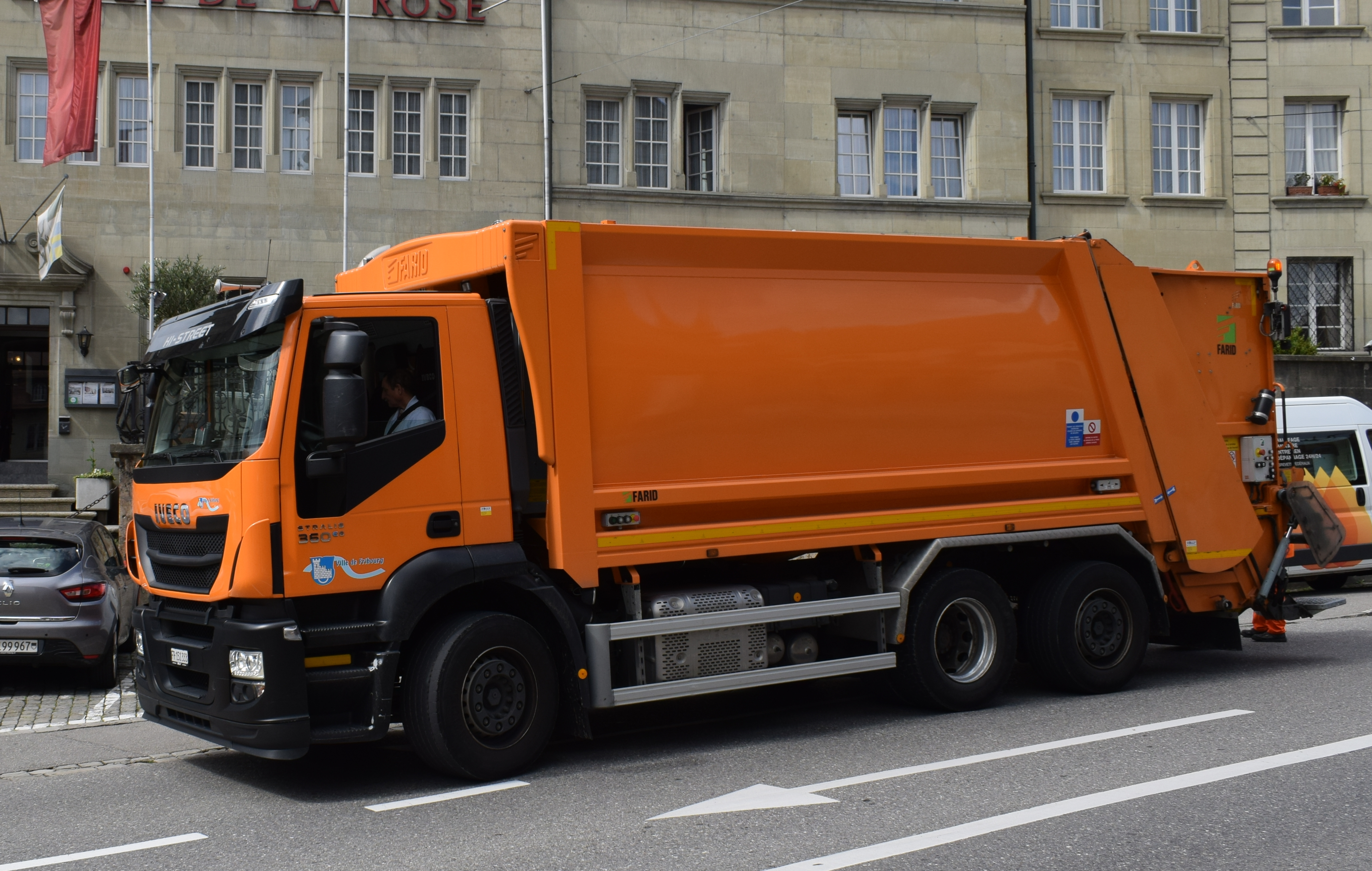 Iveco Stralis Hi-Street 360